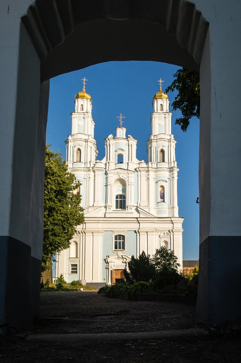 Глыбокае. Царква